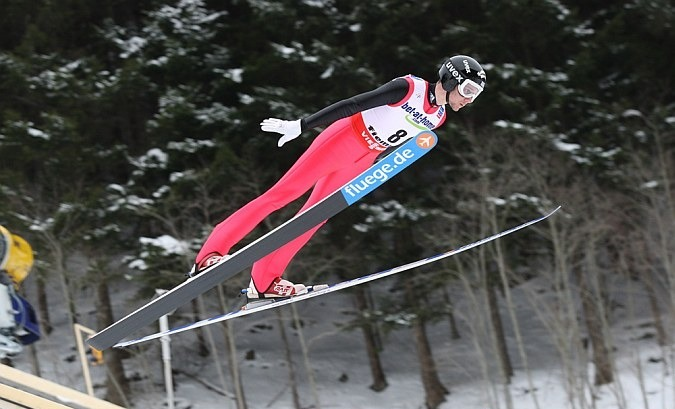 Niko Polichronidis podczas konkursu indywidualnego mężczyzn na skoczni normalnej w ramach Mistrzostw Świata 2013.